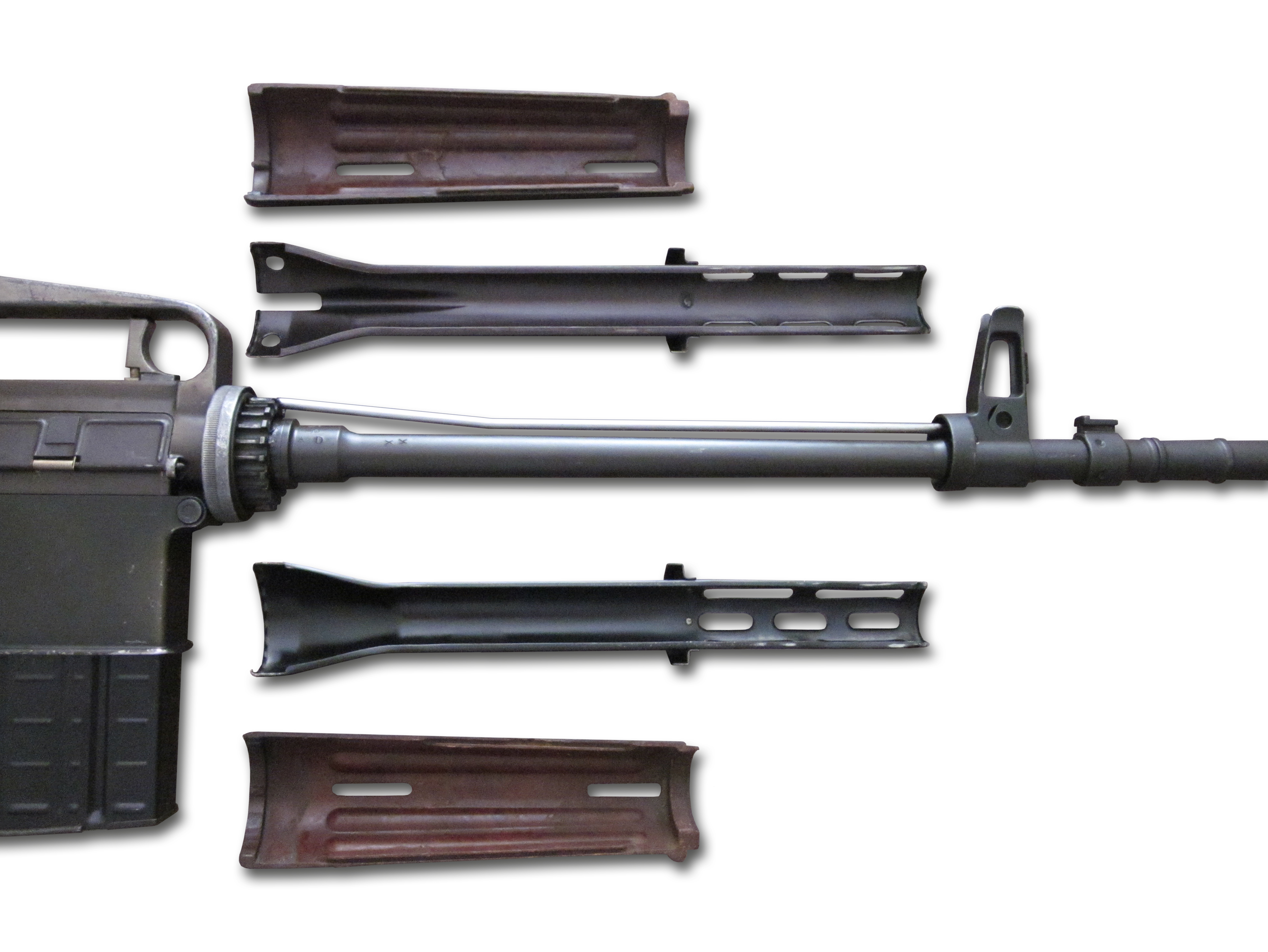 Detailaufnahme des AR-10-Zylinders und des DI-Gassystem